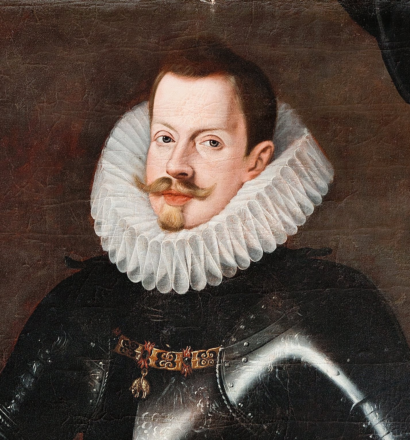 Felipe III de España (1598 - 1621).